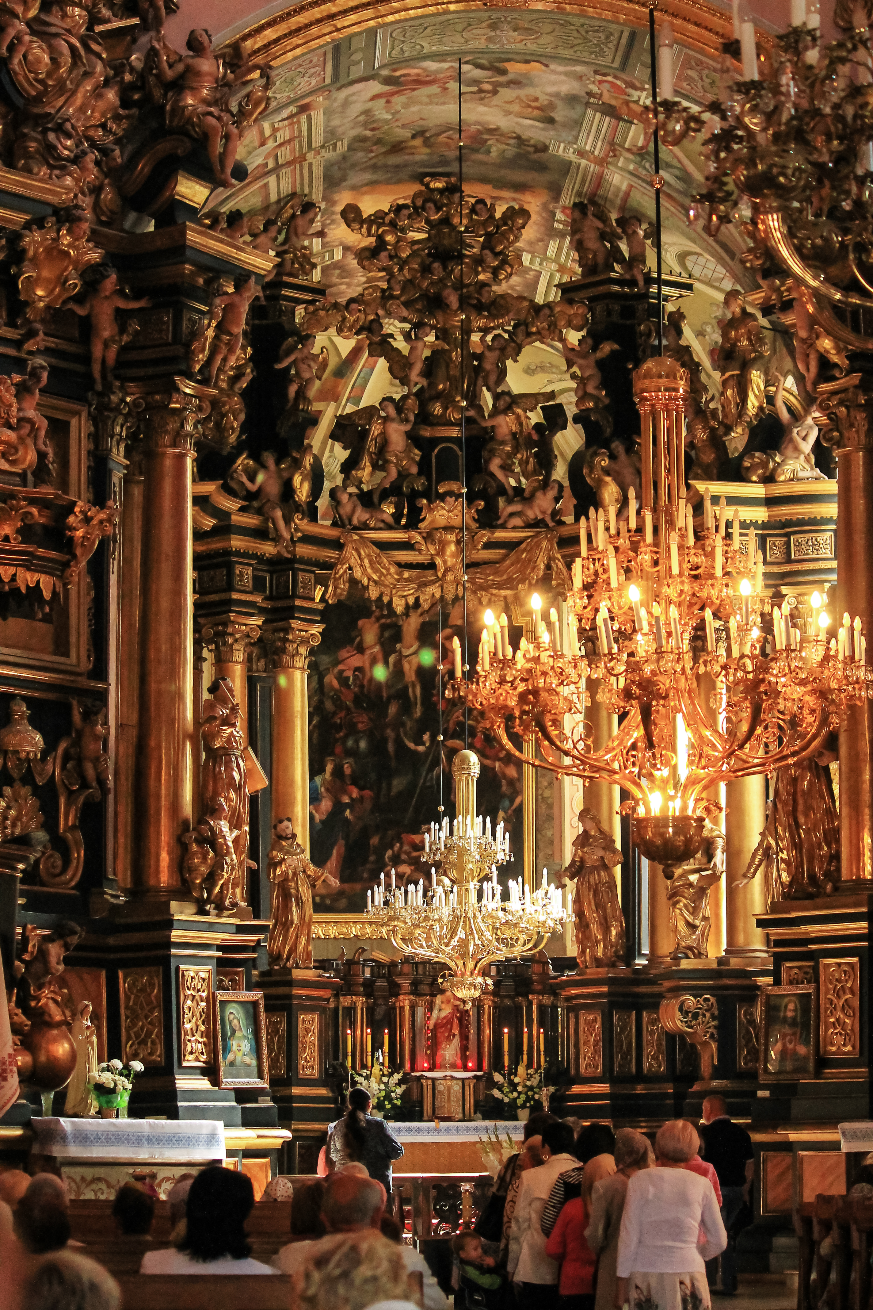 церква св.Андрія, Львів, Соборна пл., 3а